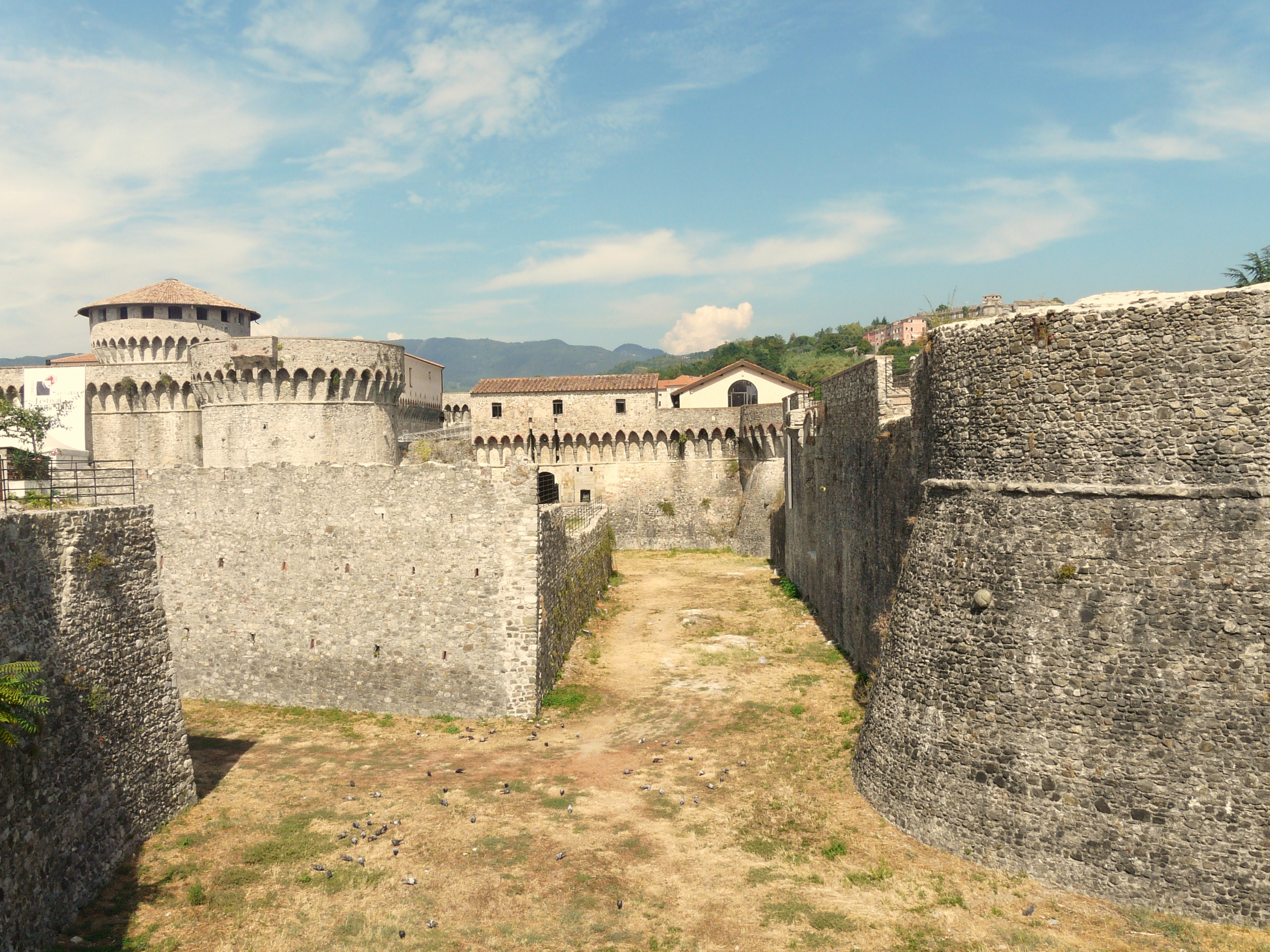 Fortezza di Firmafede, Sarzana, Liguria, Italia